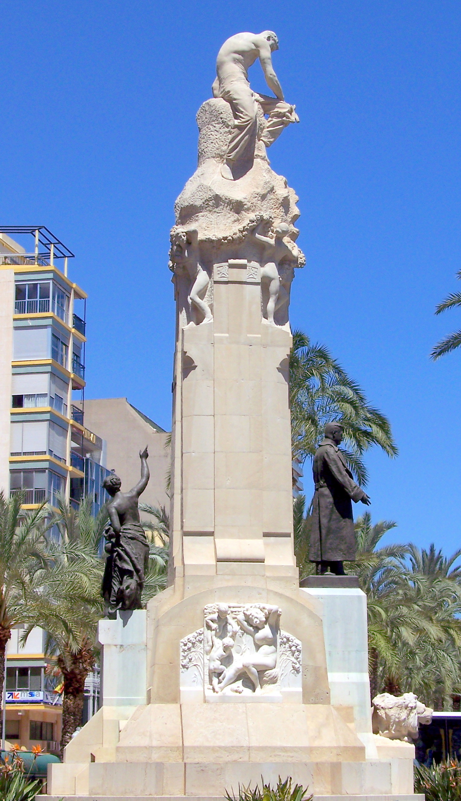 Monumento a José Canalejas, por Vicente Bañuls Aracil (1916) -Plaza de Canalejas - Alicante.